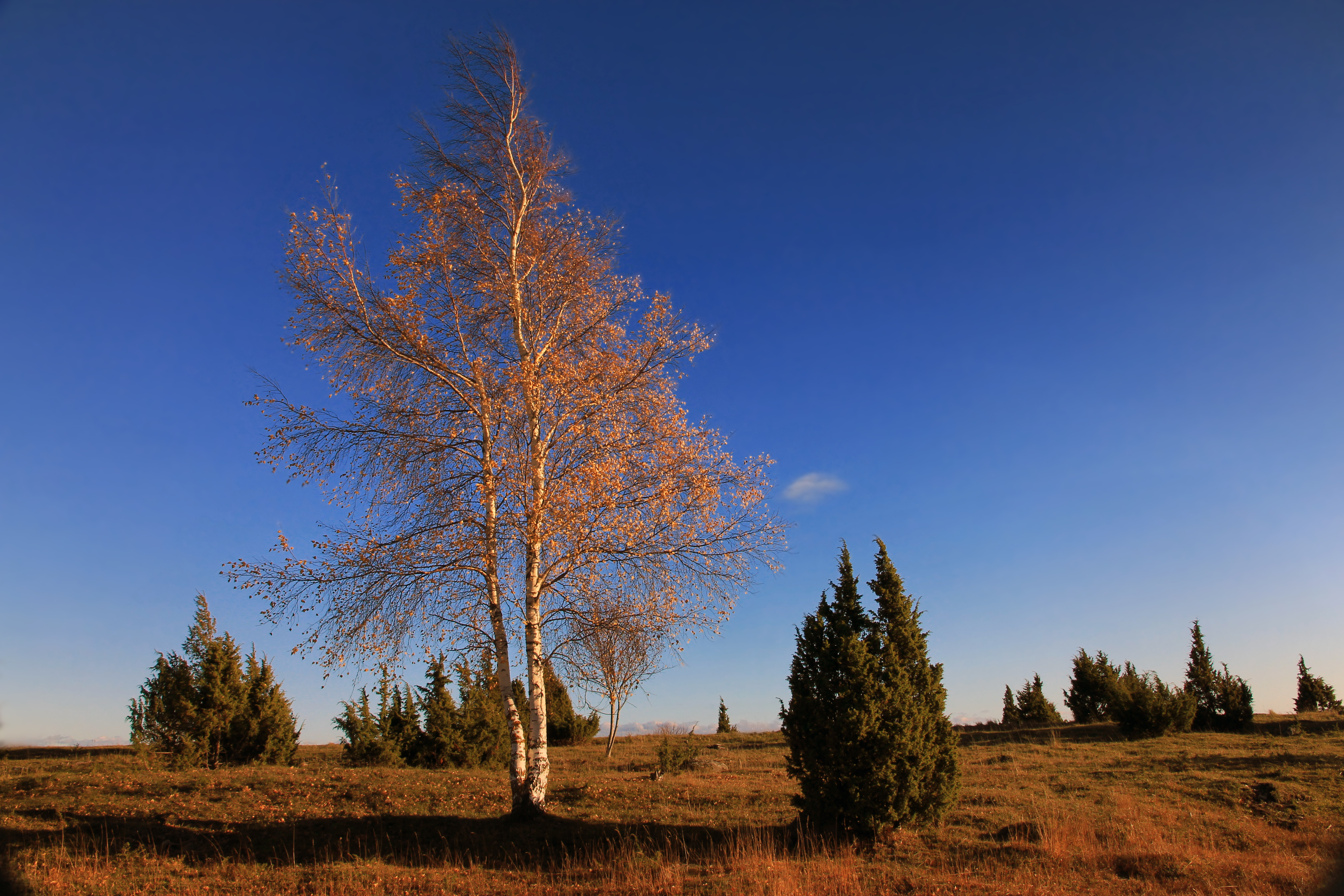 Loopealne Puise poolsaarel